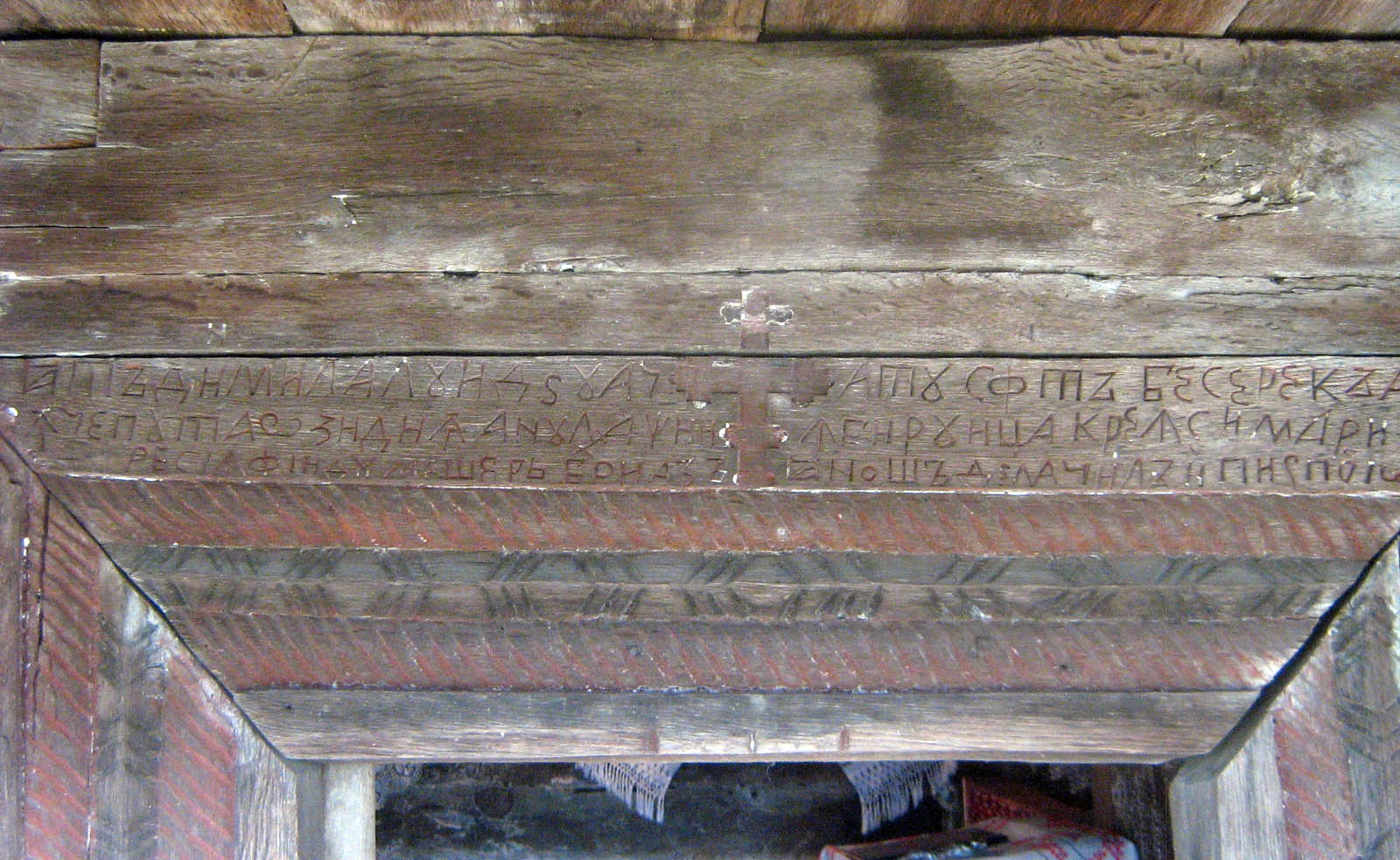 Biserica de lemn din Borza, Sălaj. Inscripţia pe portalul de la intrare.